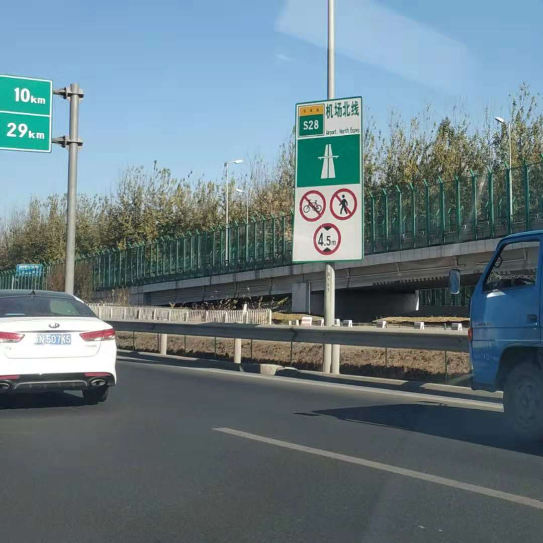 首都机场北线起点